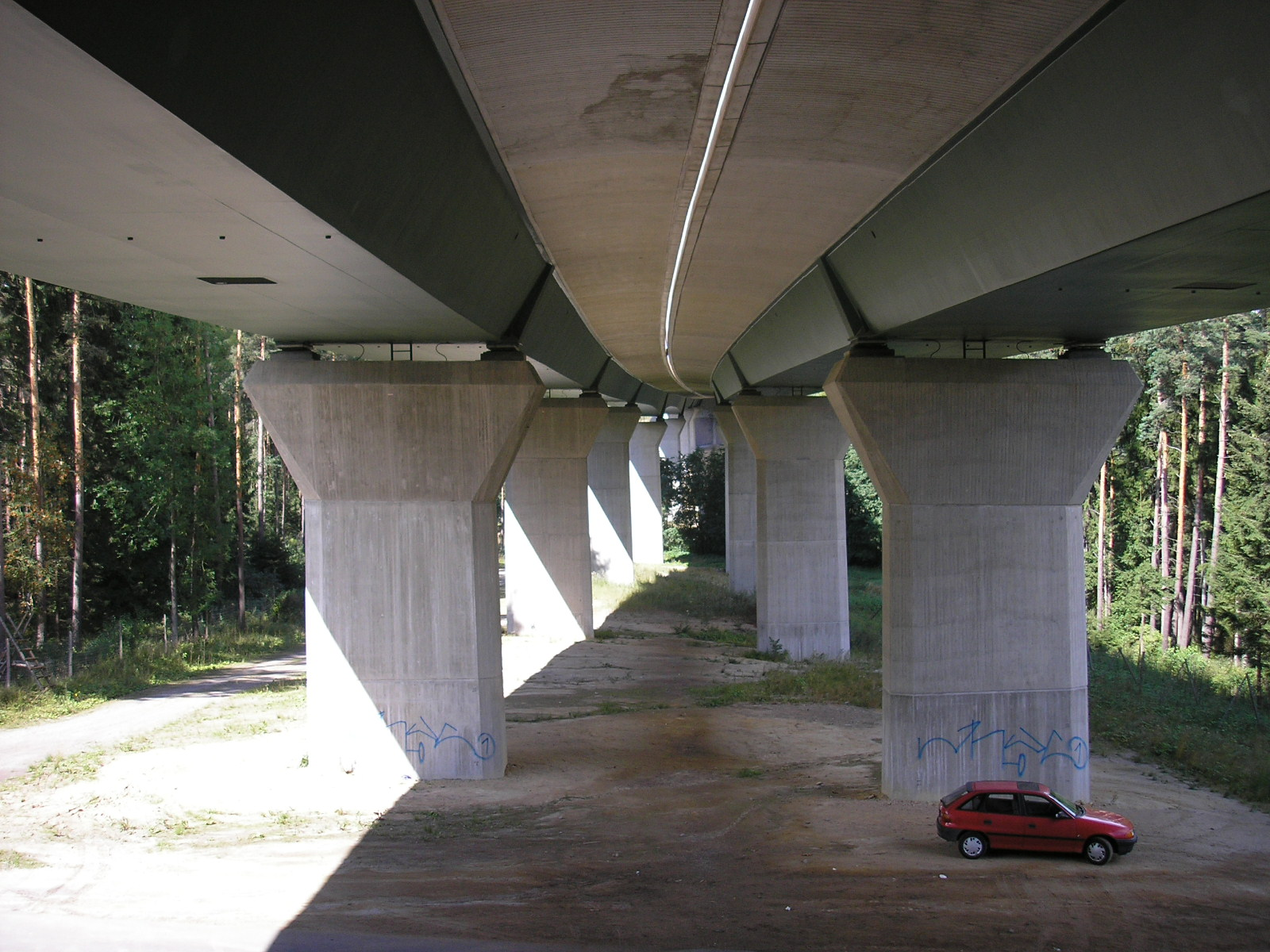 Talbrücke Streichgrund (A71) bei Ilmenau (Thüringen).